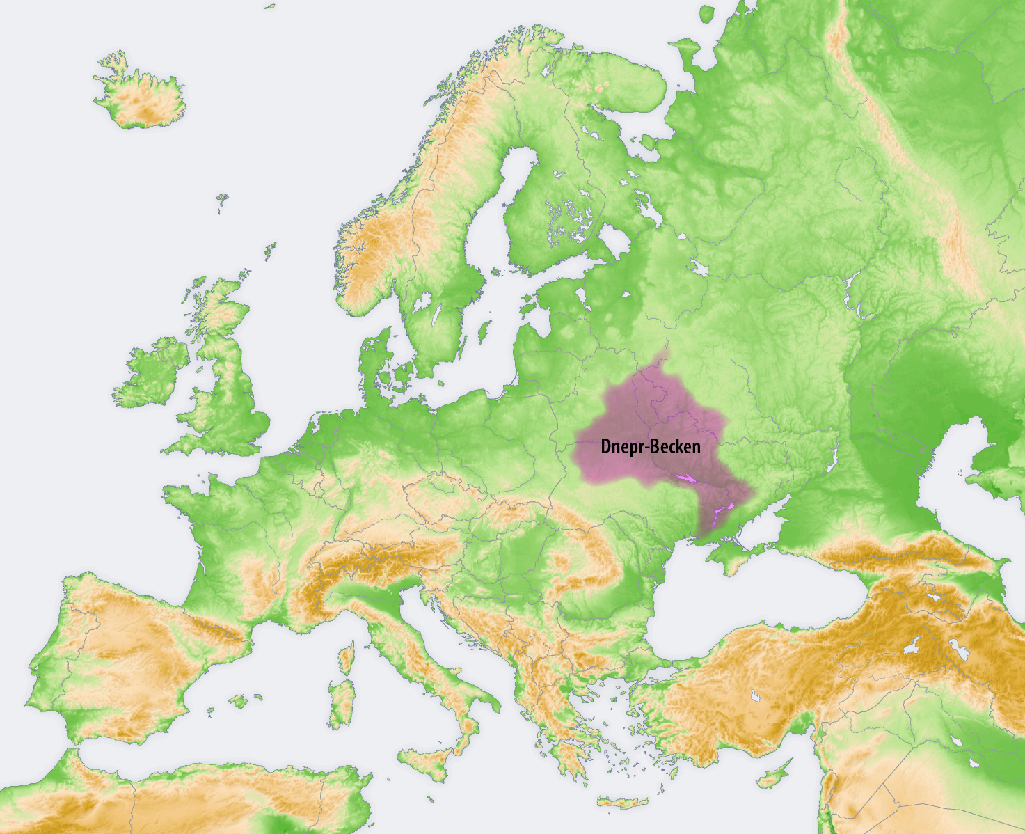 Landschaften der Osteuropäischen Ebene: Dnepr-Becken